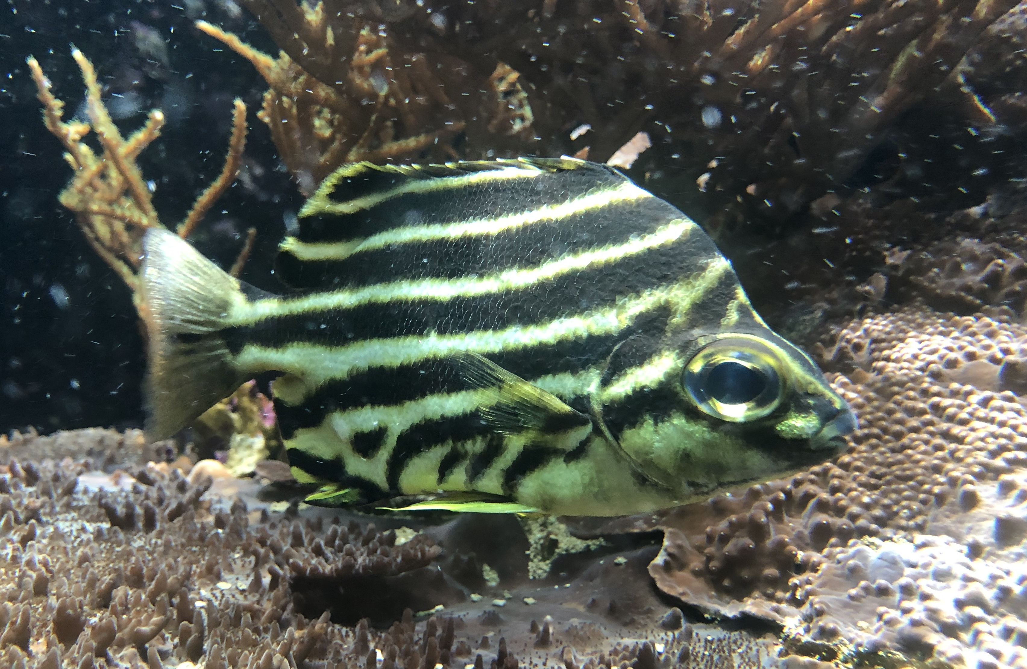 カゴカキダイ（いおワールドかごしま水族館飼育個体）